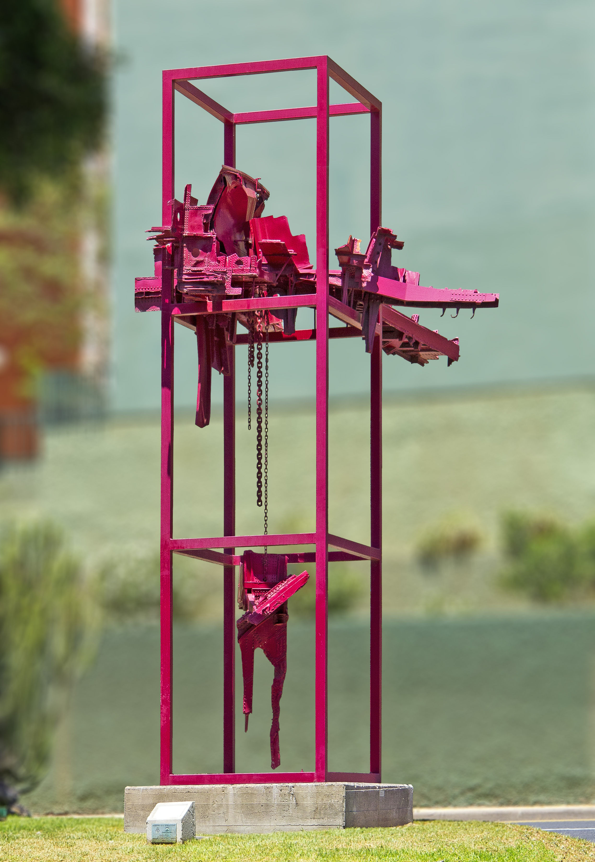 Die Skulptur des 1942 in La Laguna (Tenerife) geborenen Künstlers Juan José González Hernández-Abad wurde im Jahr 1973 im Rahmen der „Exposición Internacional de Escultura en la Calle“ der Architektenkammer der Kanarischen Inseln auf der Avenida de los Reyes Catolicos in Santa Cruz de Tenerife aufgestellt . Die Maße sind 6,00 m x 2,00 m x 2,00 m.